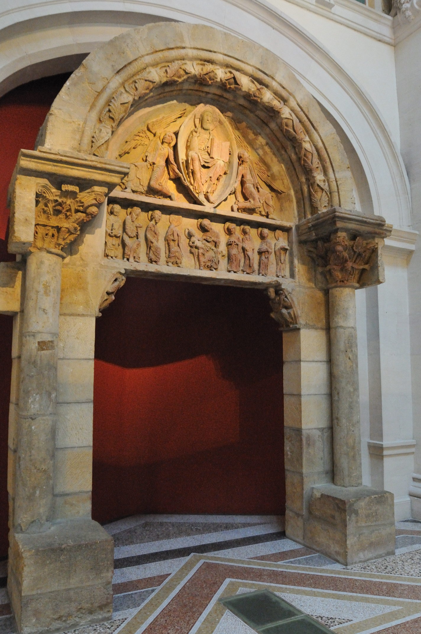 Tympan du XIIe siècle provenant de l'église d'Anzy-le-Duc, musée eucharistique du Hiéron, Paray-le-Monial, Saône-et-Loire, France